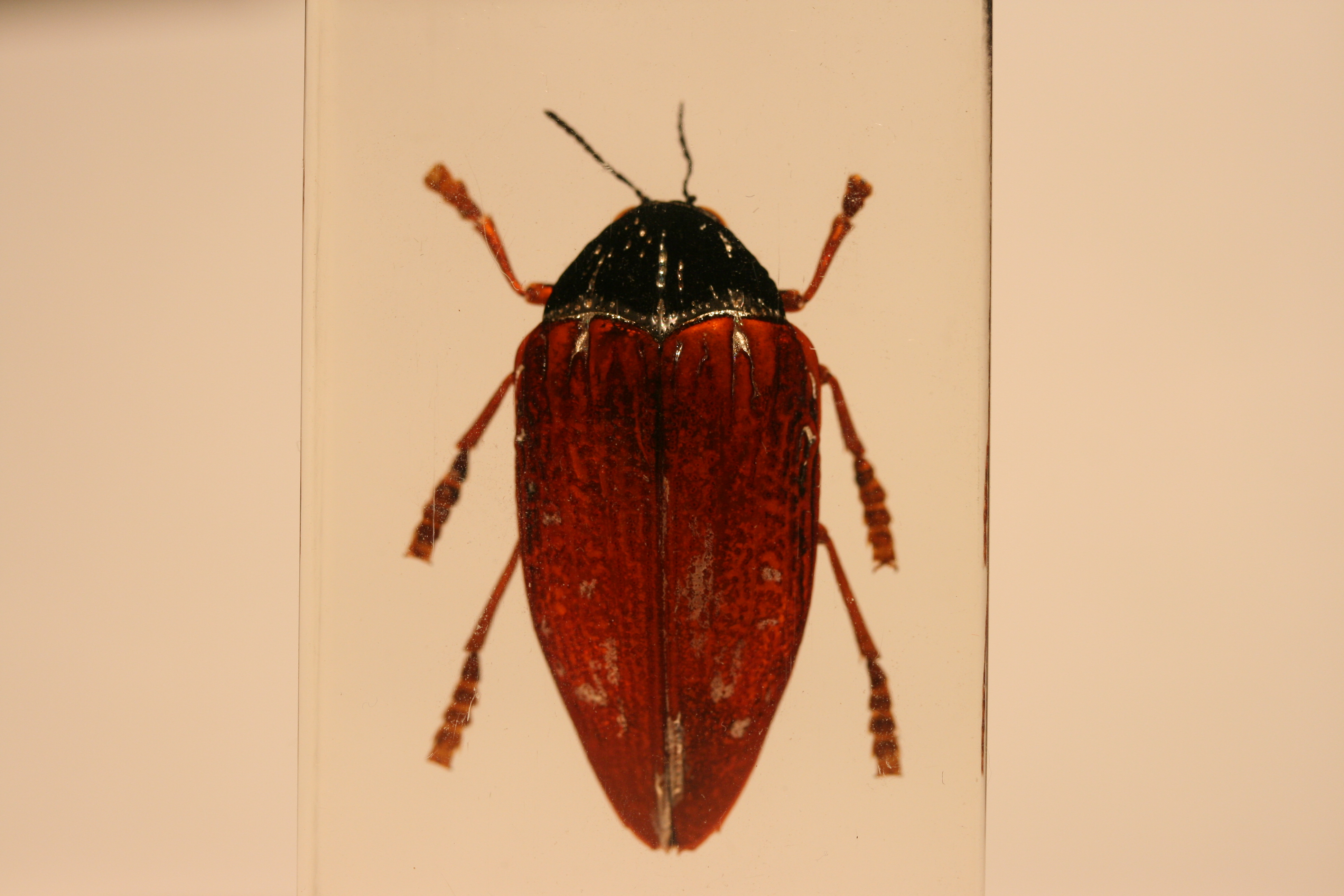 Fuchsroter Prachtkäfer